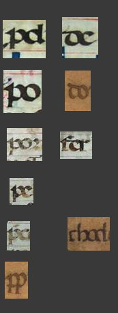 Beispiele der Bogenverbindungen der gotischen Minuskel aus einer Handschrift in Kotor